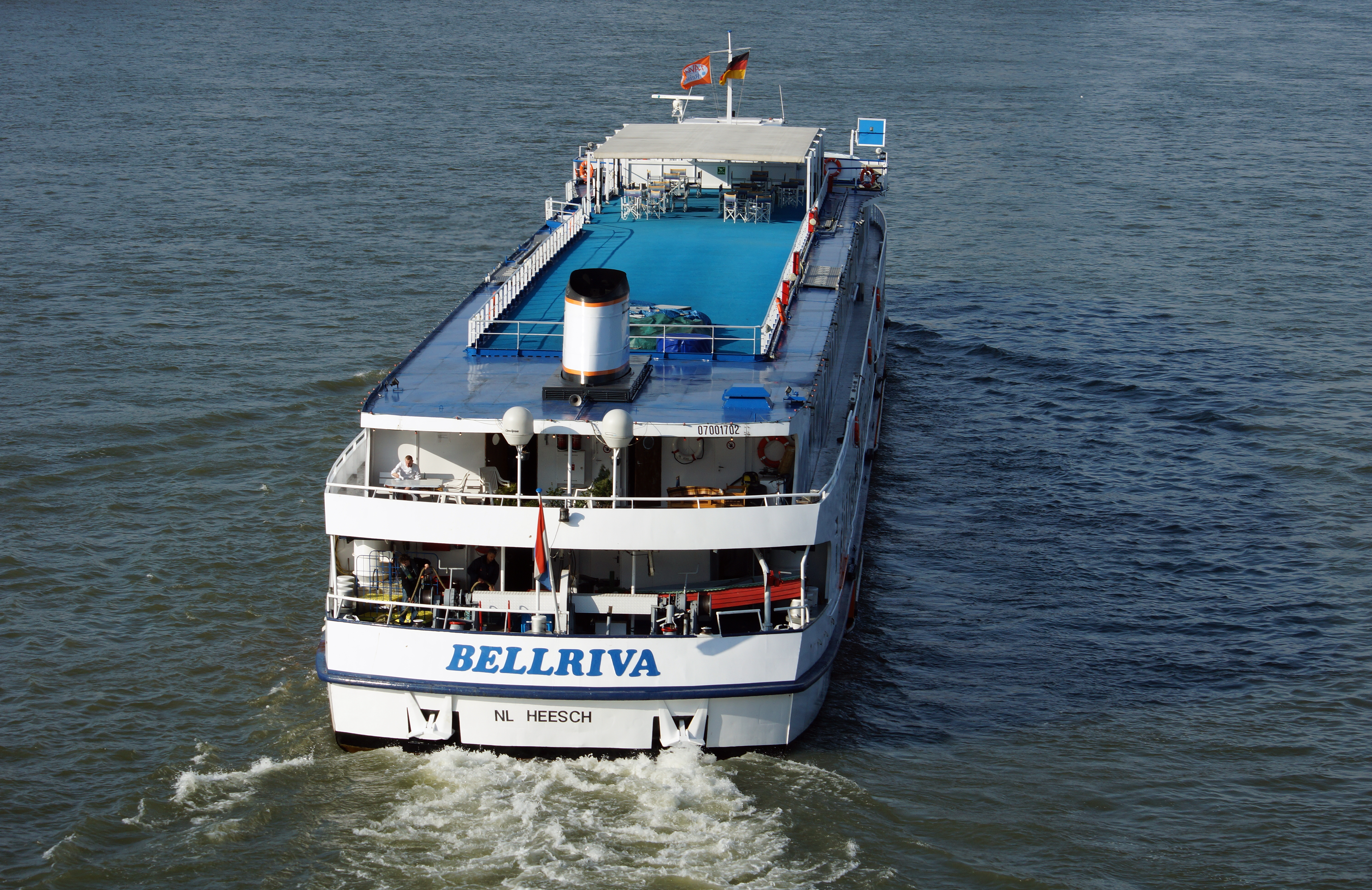 Flusskreuzfahrtschiff Bellriva in Köln.